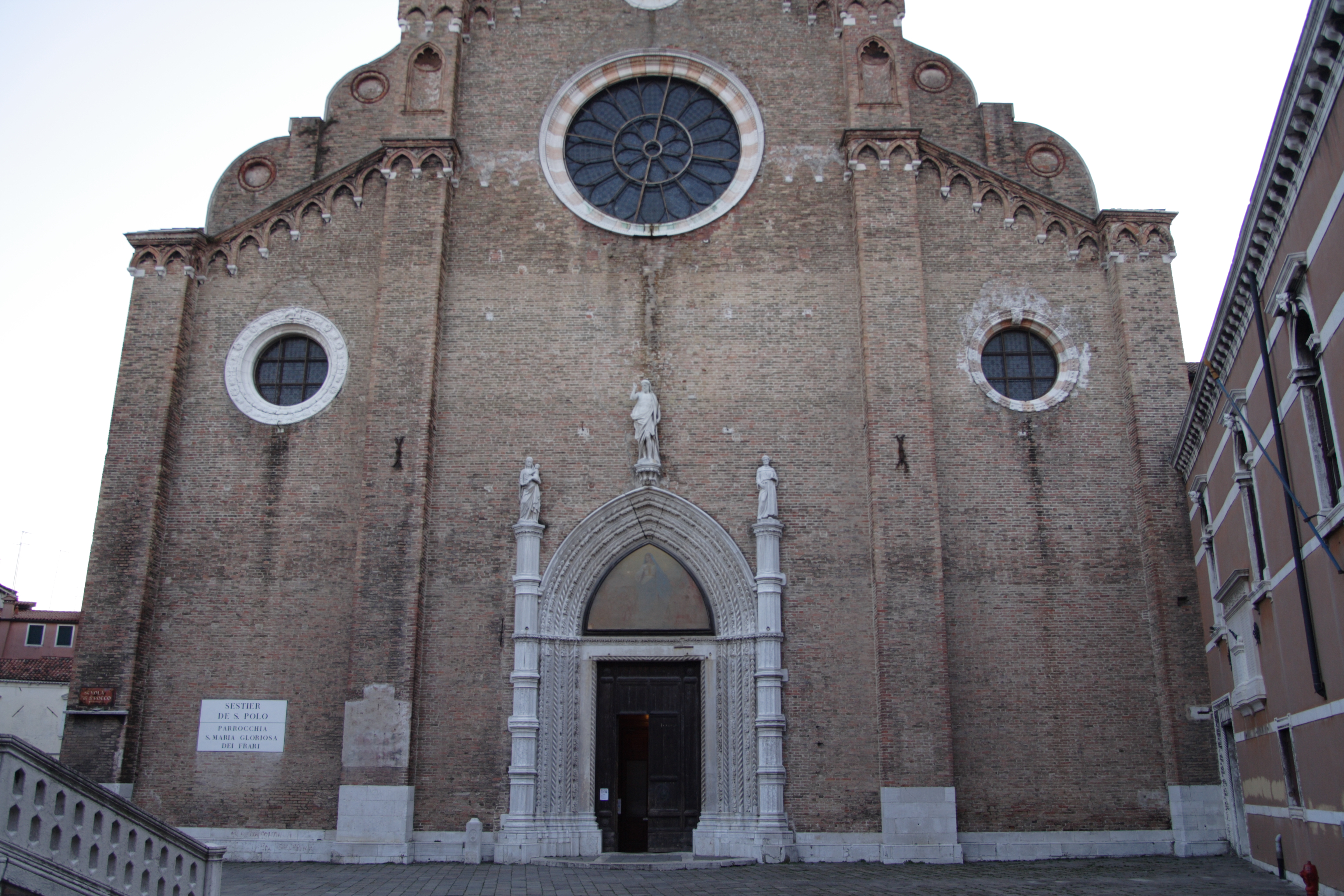 Santa Maria Gloriosa dei Frari, facade